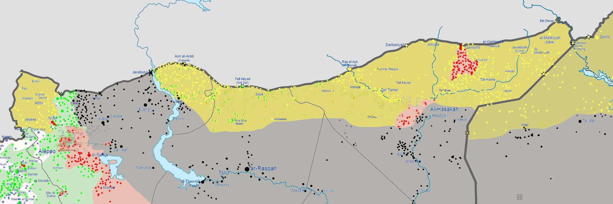 Lage in Rojava Juni 2015